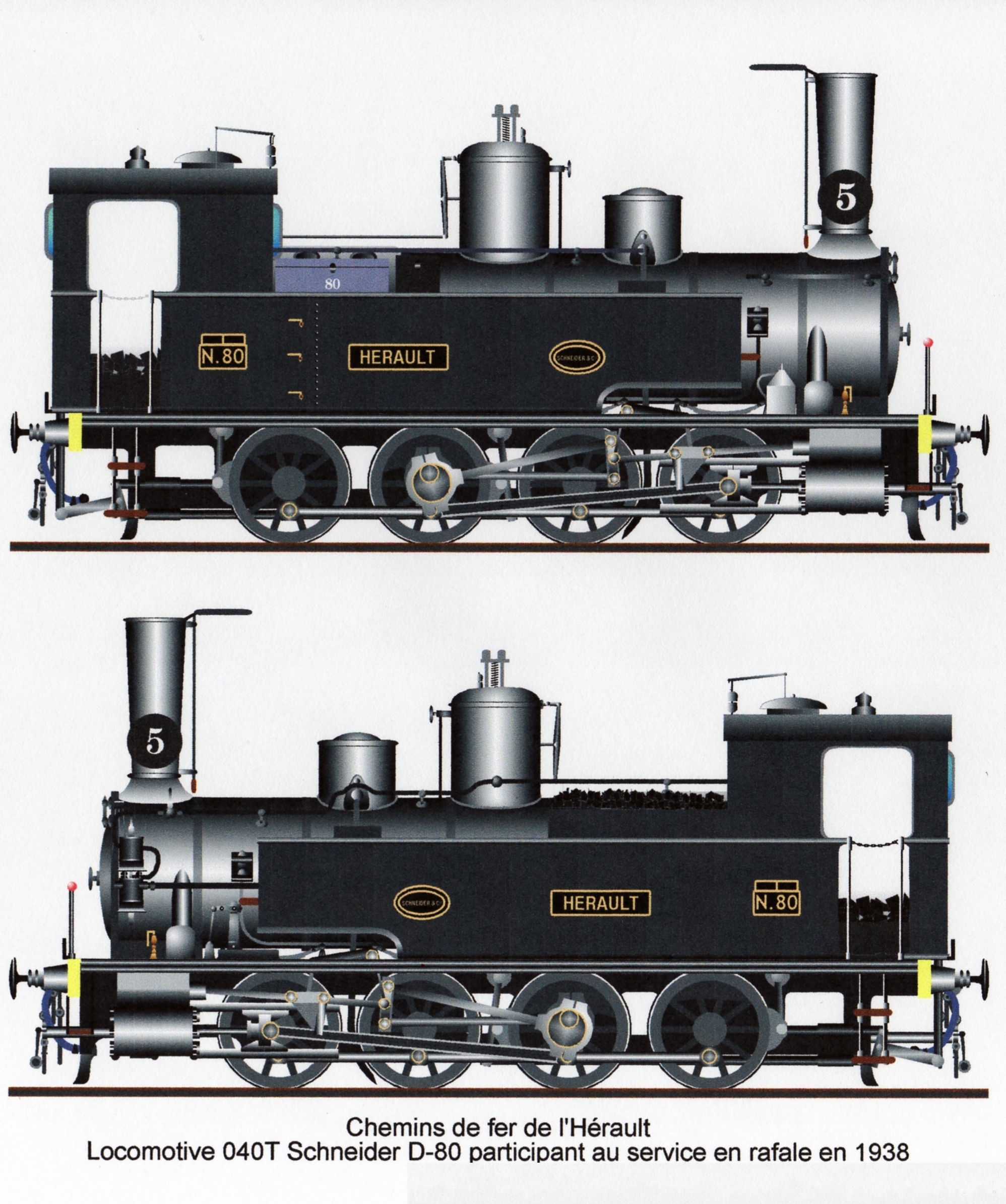 Chemins de fer de l'Hérault - Locomotive 040T Schneider D-80 (équipée d'origine du frein Westinghouse) affectée au service en rafale en 1938. Entre Montpellier et Palavas, 25 allers-retours quotidiens sont assurés par 6 rames de 9 voitures et 1 fourgon et 8 machines. Pour s'y retrouver dans un trafic aussi dense, les locomotives portent un indice chiffré à la base de la cheminée.